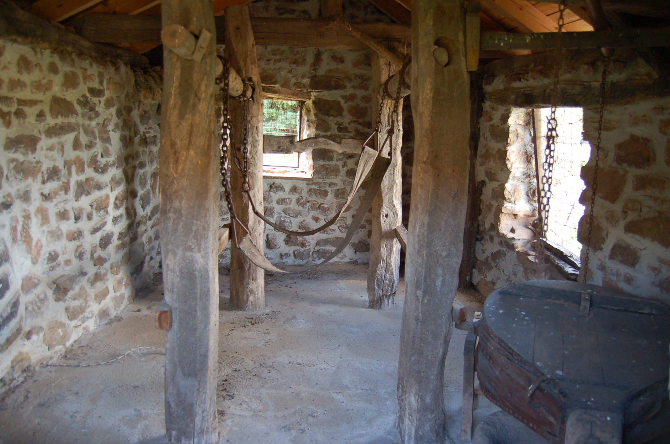 Fragua en Monasterio de la Sierra